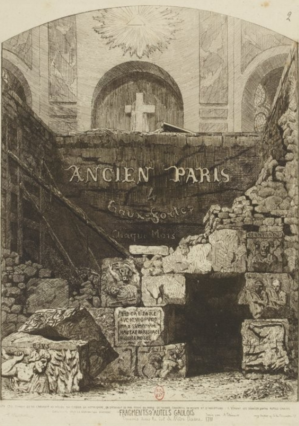 Fragments d'autels gaulois trouvés dans le sol de Notre-Dame, 1711 : "En 1711, tandis qu'on creusait au milieu du chœur de Notre-Dame, on découvrit un mur formé en partie de pierres couvertes de reliefs et d'inscriptions : c'étaient les débris de quatre autels gaulois (etc.)". Dessin par Adolphe Potémont, 1862-63. Autel à Cernunnos ? avec inscriptions du Pilier des Nautes.